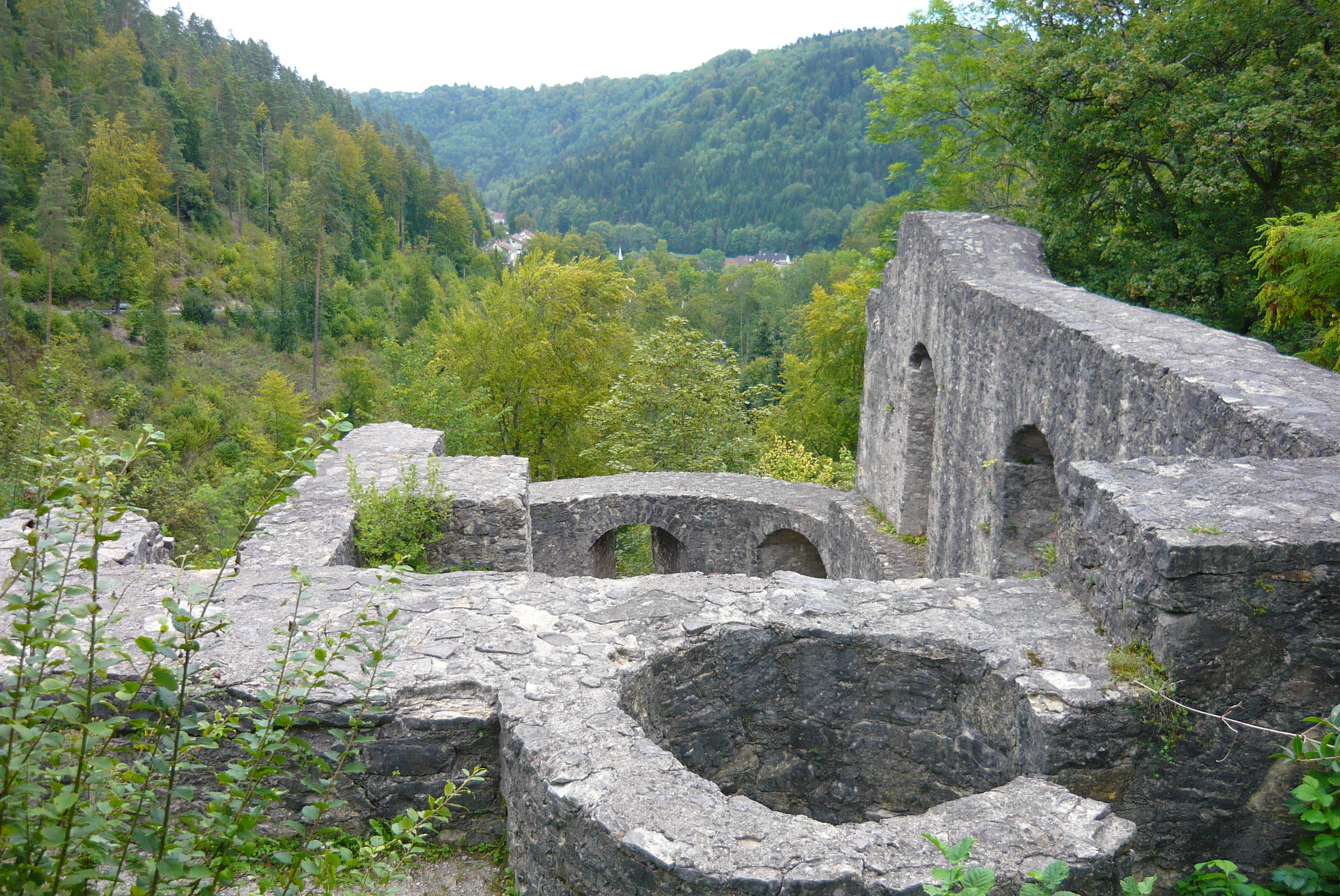 View over the ruin of the chapelle from Herrenzimmern Castle, behind the village Talhausen, Sicht über die Herrenzimmerner Burgkapelle nach Talhausen